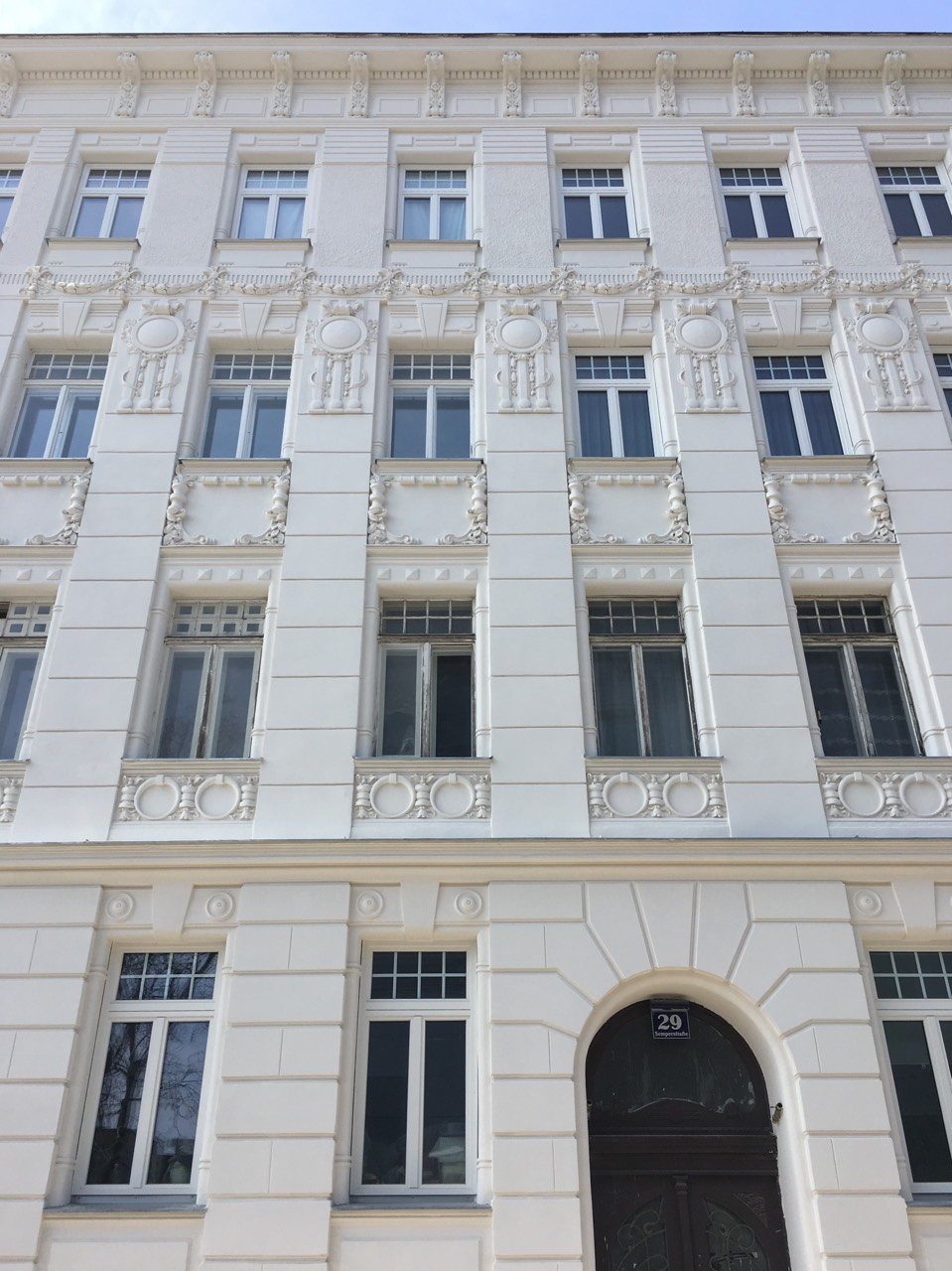 Semperstraße 29 , Wien 1180, Wohnhaus Lola Carr